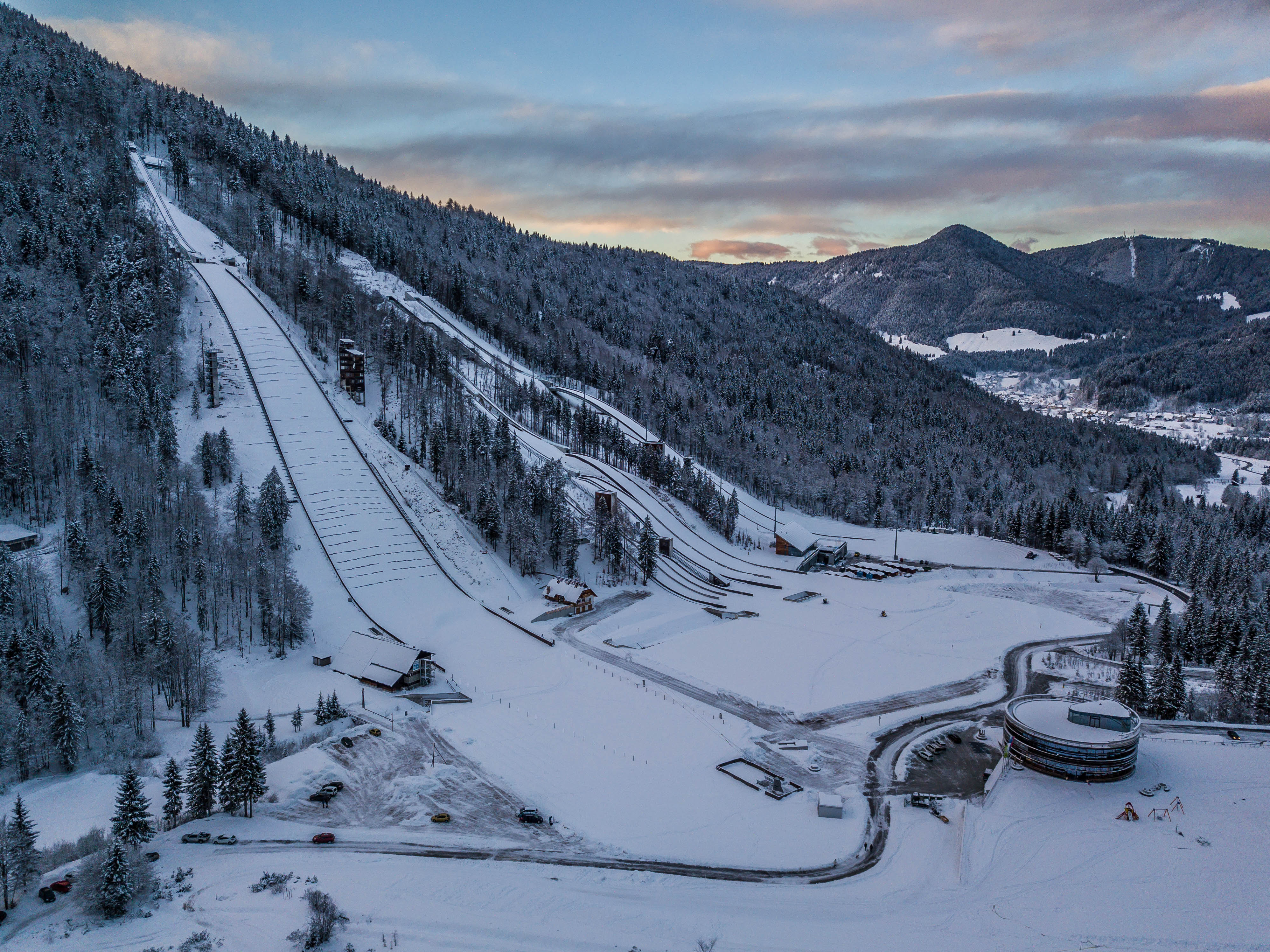 Planica, Slovenia